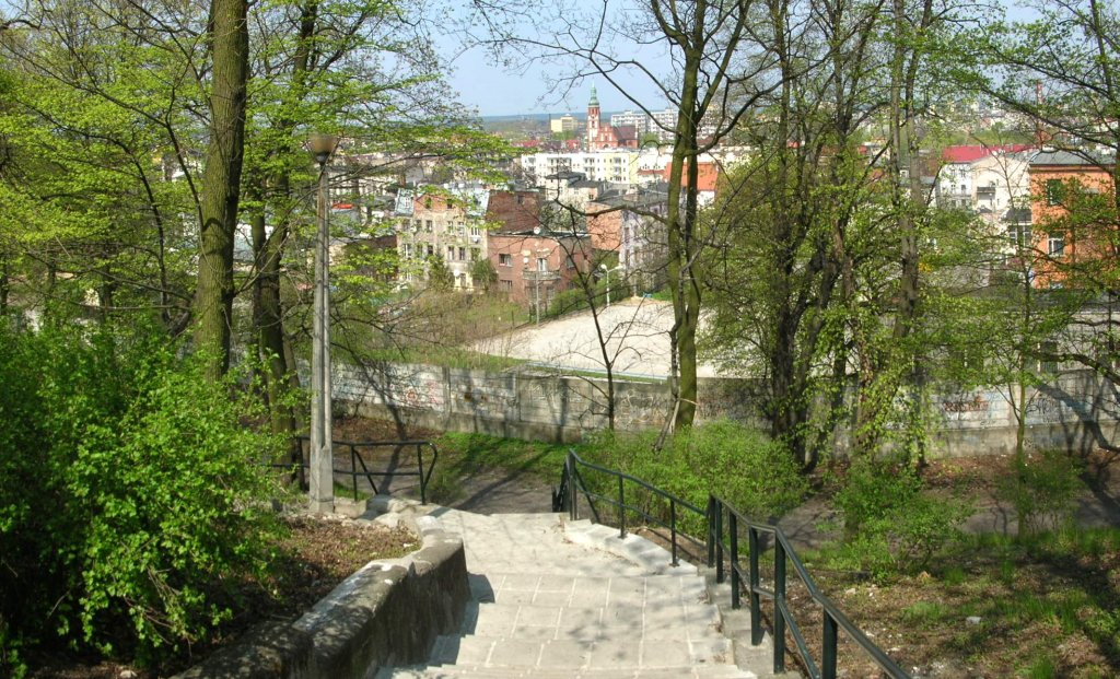 Park Henryka Dąbrowskiego w Bydgoszczy